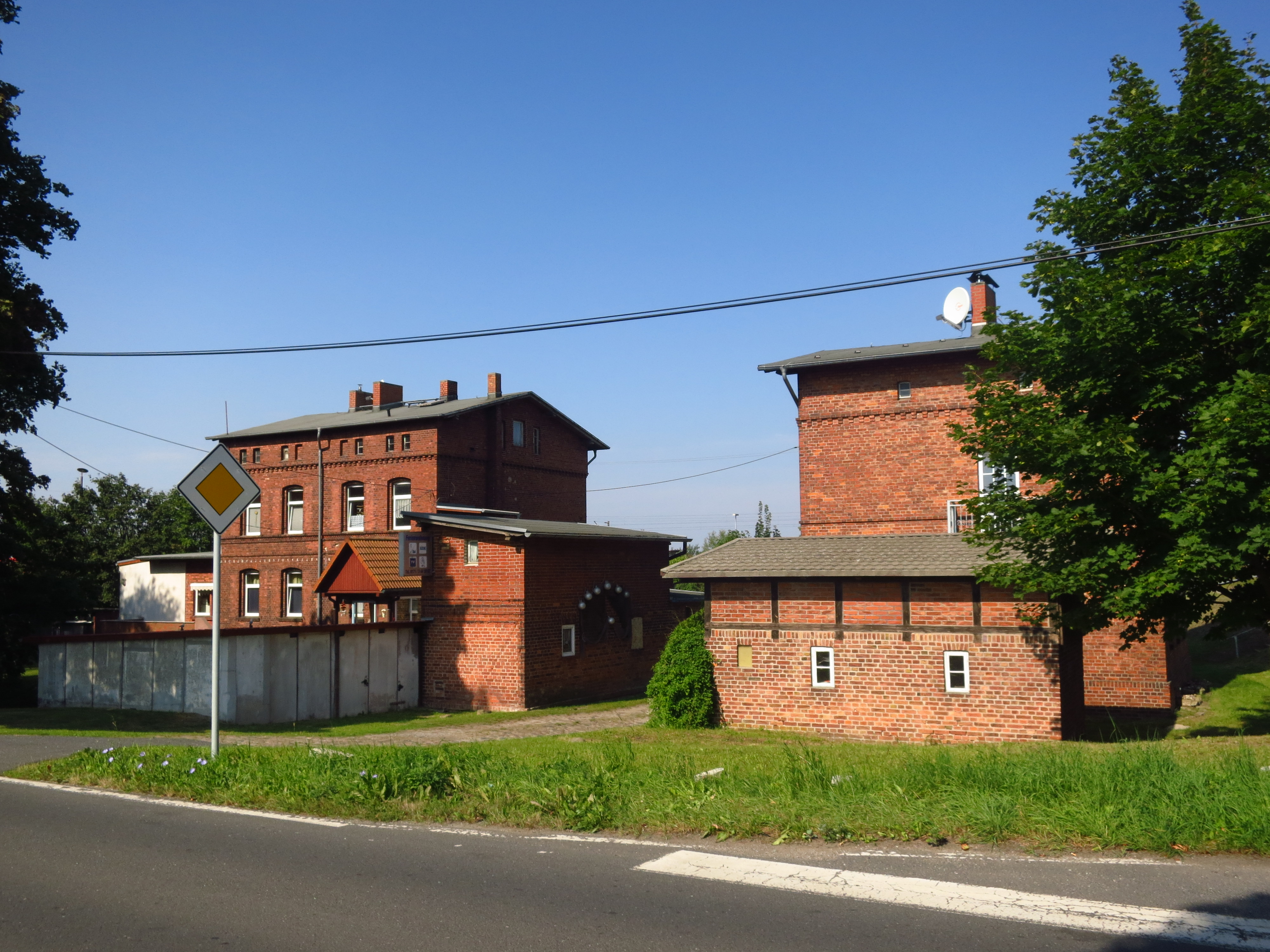 Dienstgebäude/Wohnhaus des Schmalspurbahnhofs Altefähr, Kulturdenkmal, Am Bahnhof 4, 5, Blick von SO